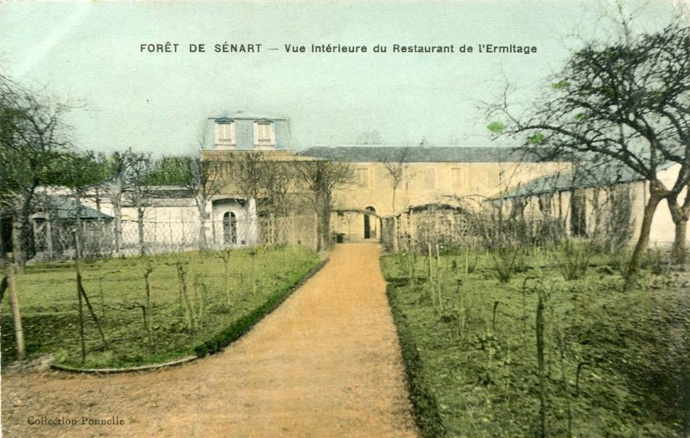 Vue intérieur du restaurant de l'Ermitage, forêt de Sénart Carte postale ancienne colorisée